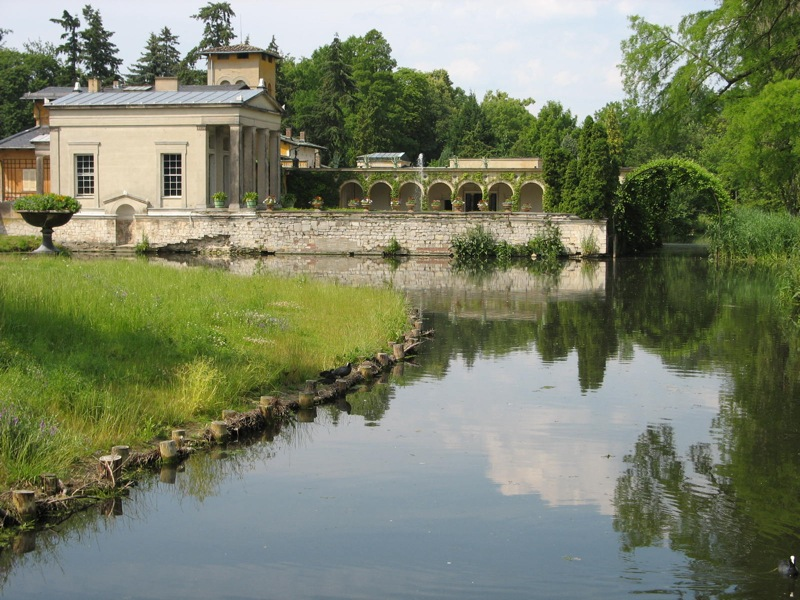 Römische Bäder in Potsdam (Roman bathes in Potsdam, Germany)